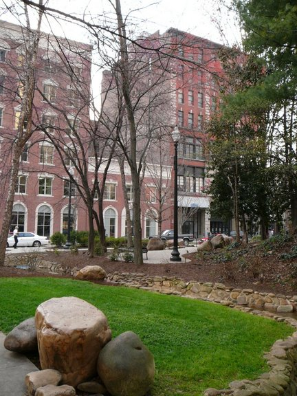 Krutch Park, Knoxville, TN